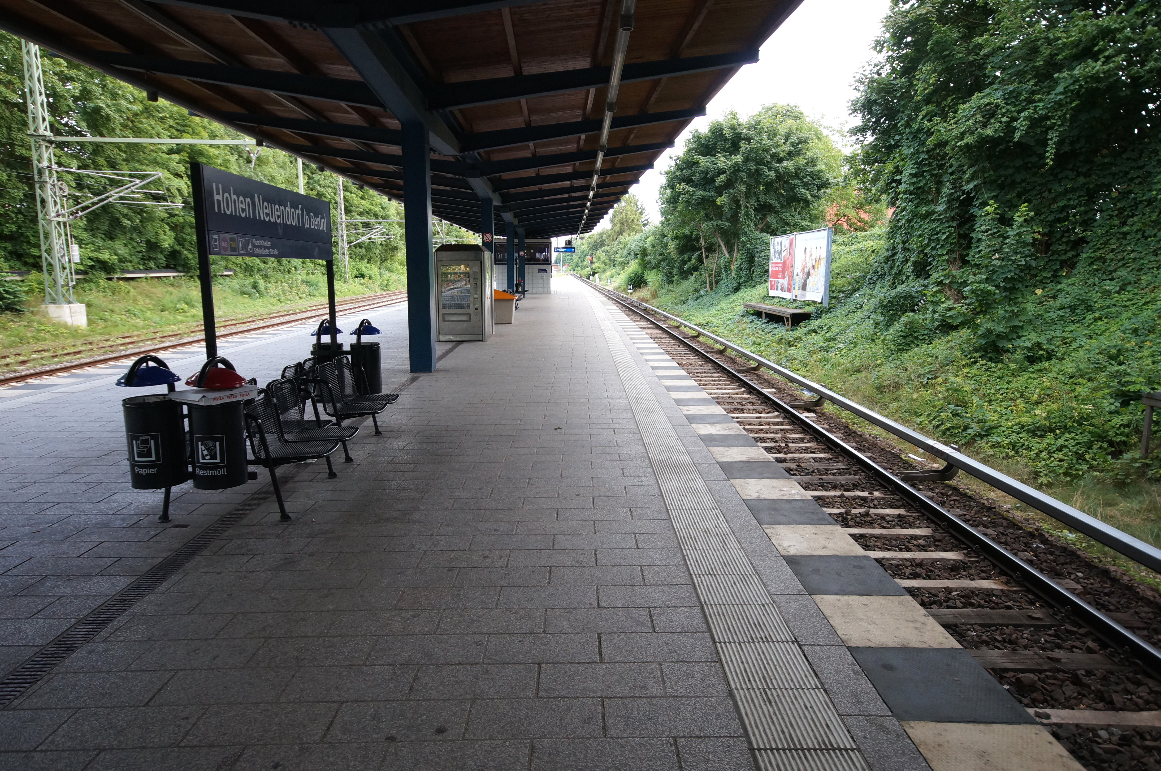 Die Bahnsteige des Bahnhofs Hohen Neuendorf (b Berlin)